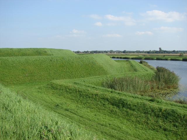 Bation in Heusden